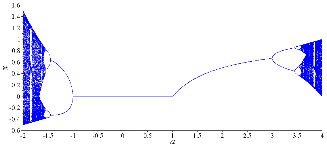 ロジスティック写像分岐図、パラメータaが-2から4まで